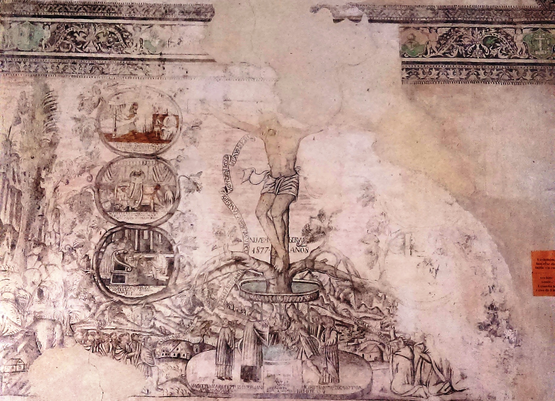 Templo y exconvento de los Santos Reyes, Metztitlán